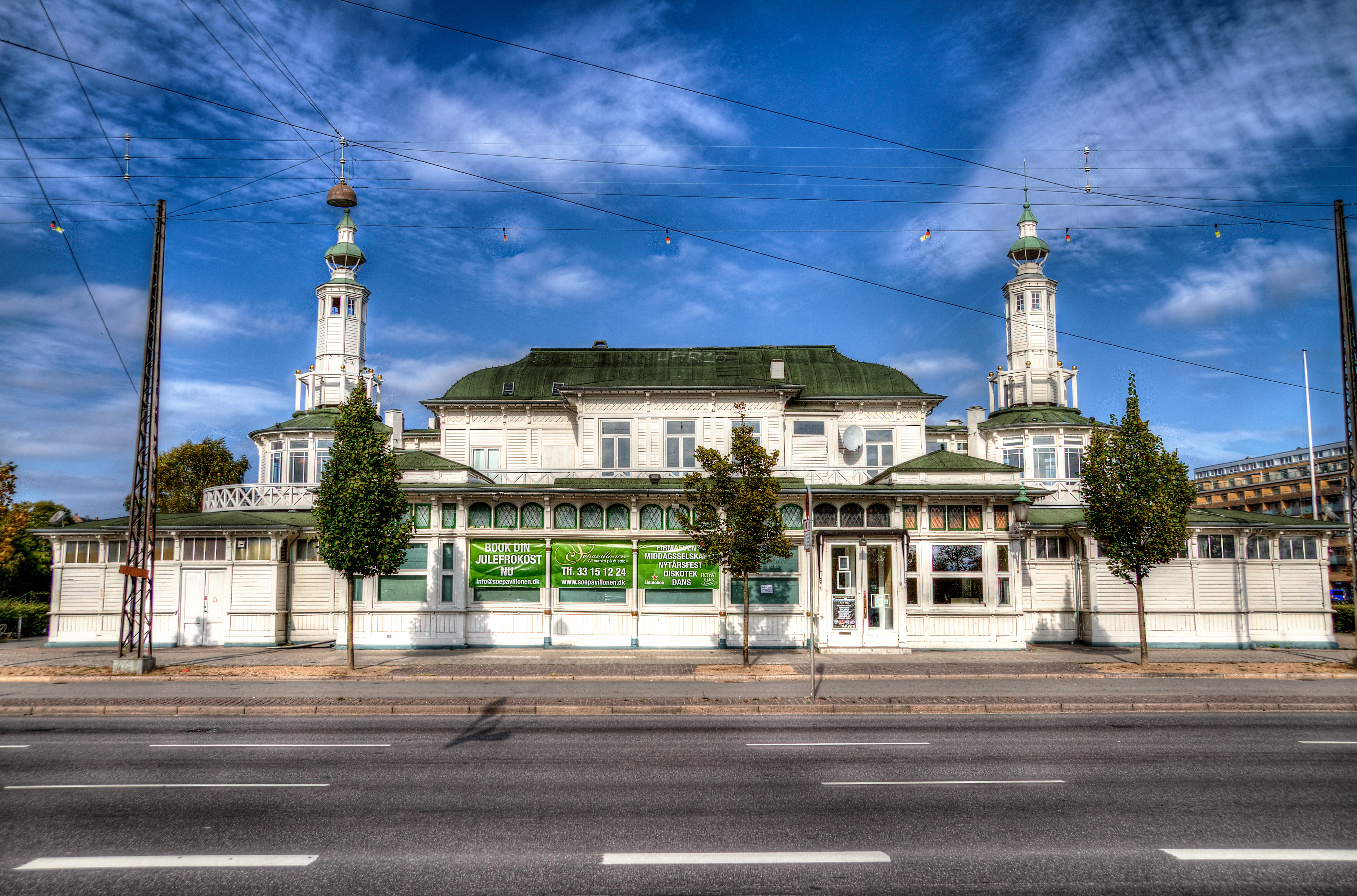 Søpavillionen set fra Gyldenløvesgade.